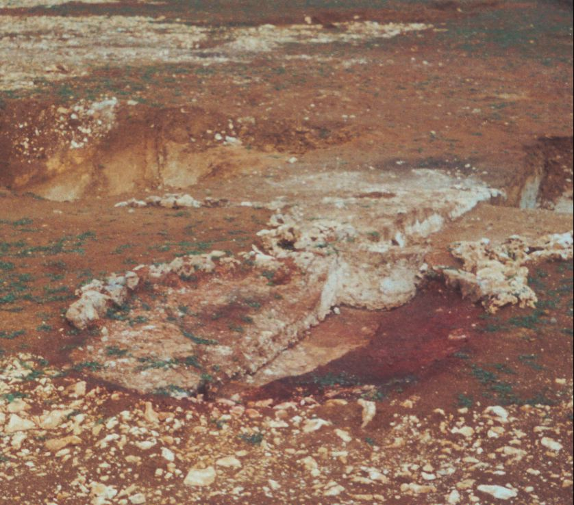 Date : 14 mai 2005, vers 15 h 00 Source : photo personnelle d'archeos Description : Zone de rubéfaction révélant un possible foyer, découverte en 2005 à proximité d'un bâtiment d'habitation proche de temples, le tout d'époque gallo-romaine, lors de l'agrandissement de la ZAC de Saint-Éloi à Poitiers Licence